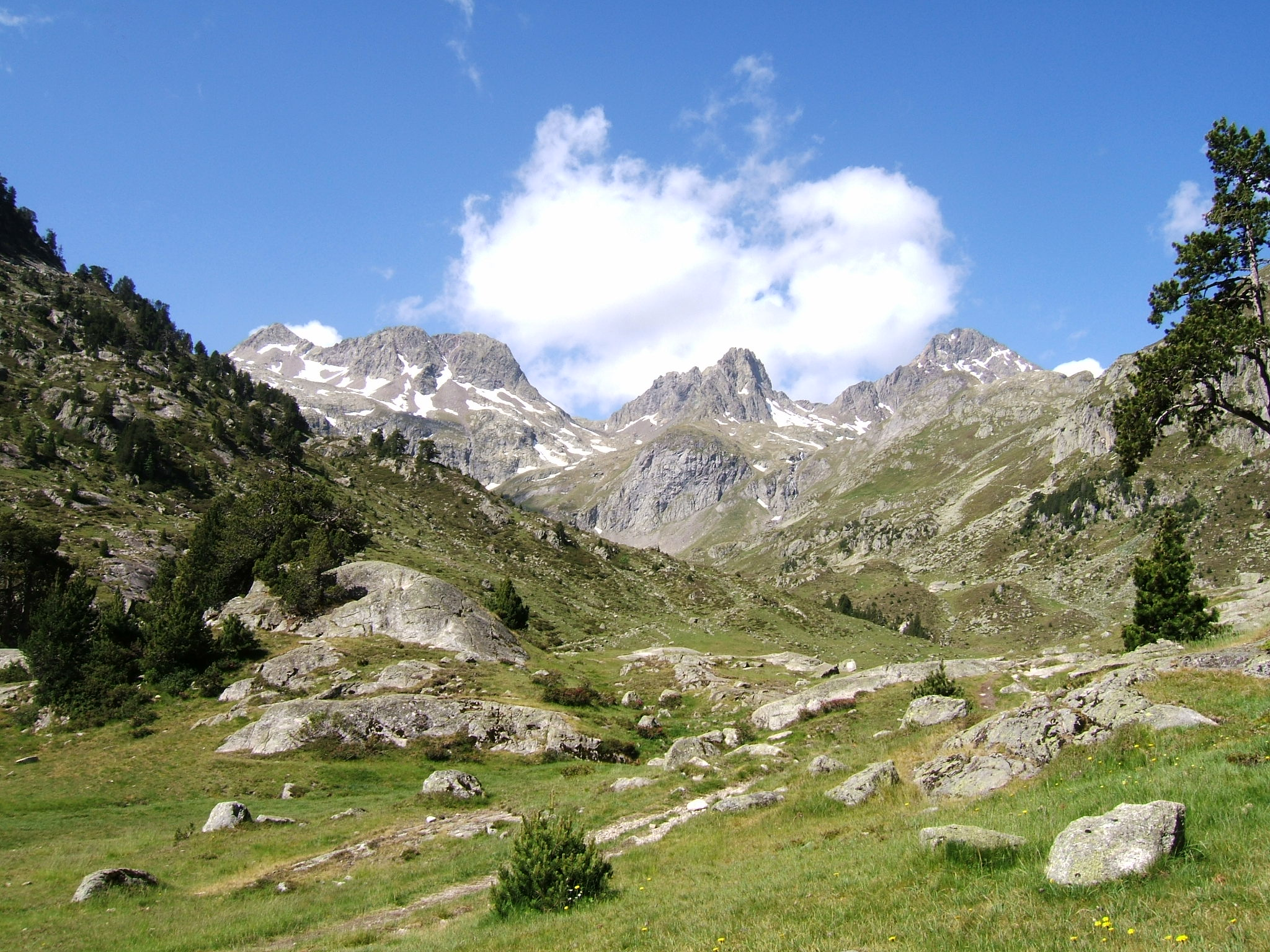 Pointe de la Muga, Pic Falisse et Grande Fache, vus depuis le Pla de la Gole (refuge Wallon).